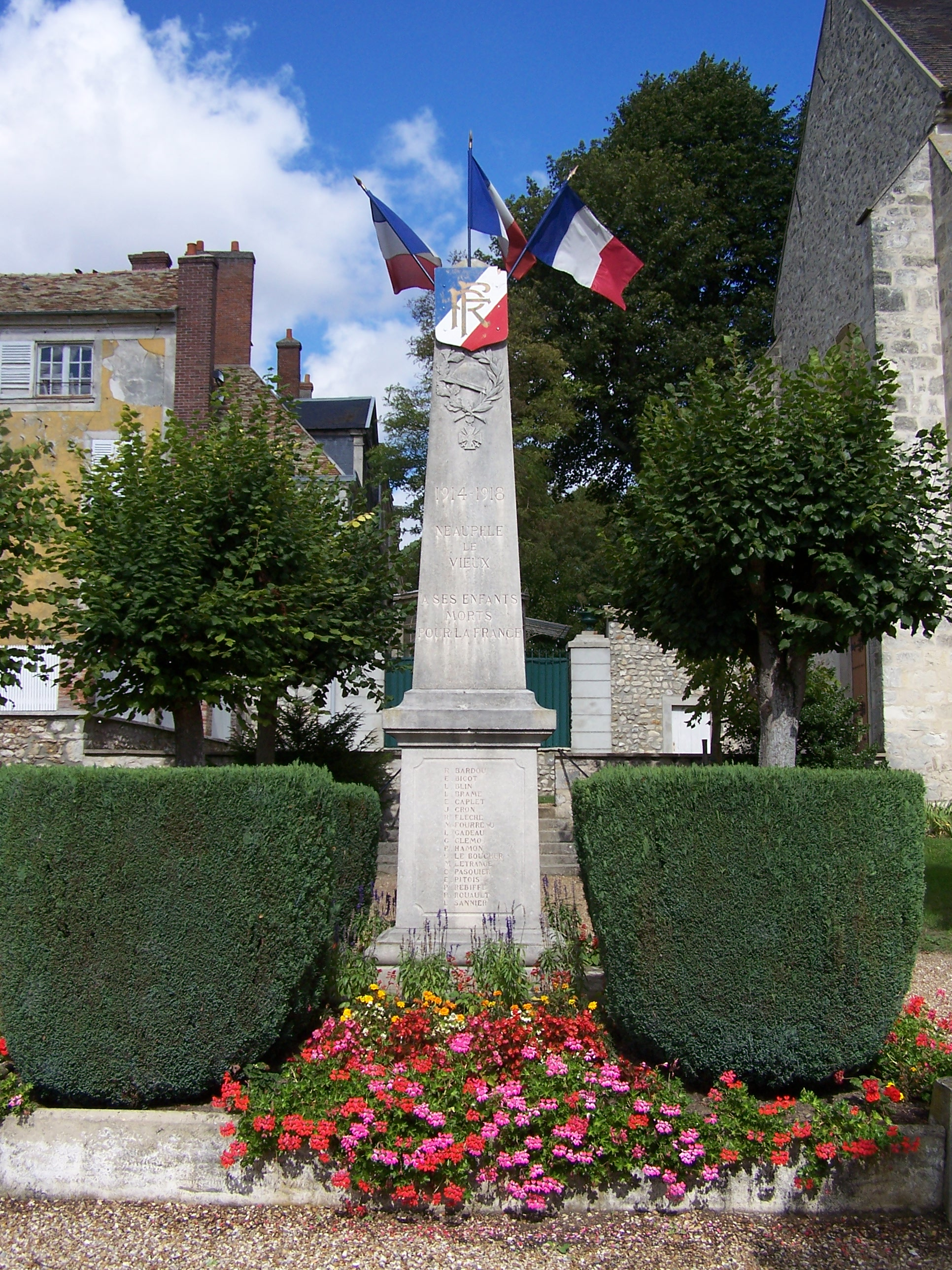 Monument aux morts de Neauphle-le-Vieux (Yvelines, France)